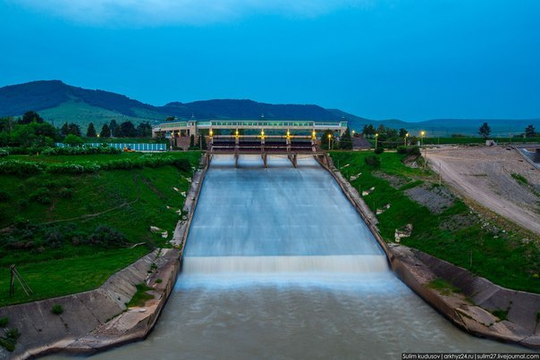 Водохранилище в Усть-Джегуте. Здесь берет начало Большой Ставропольский Канал.